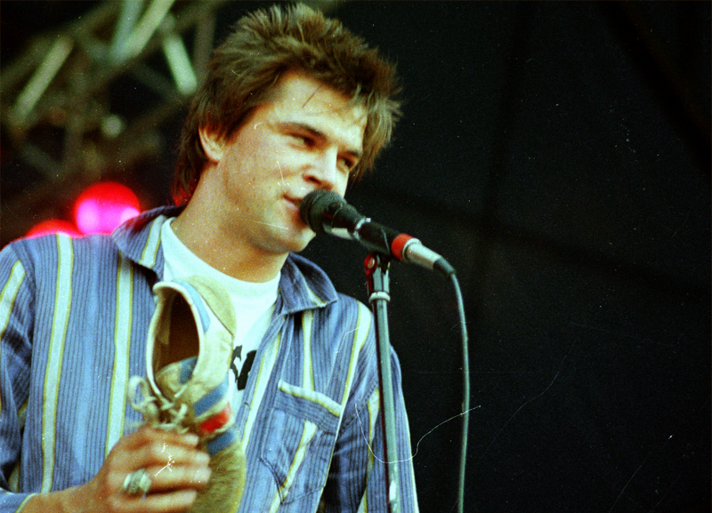 Campino, Sänger der Toten Hosen, 1987 bei einem Konzert in Garching bei München.